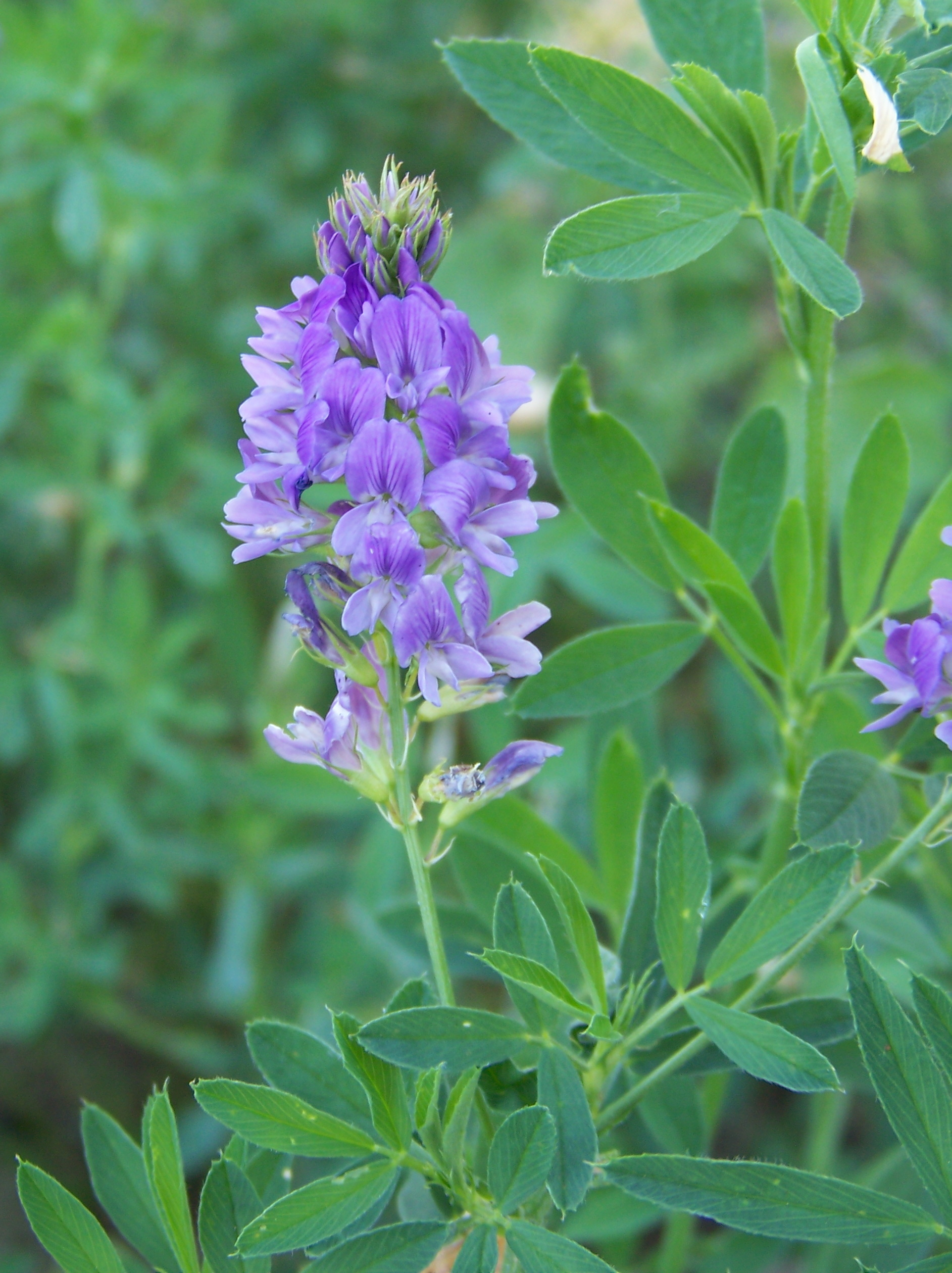 Medicago sativa sativa : Inflorescencia; hojas trifolioladas - Camino de la Azarbe de Patricio, Albatera (Alicante, España).